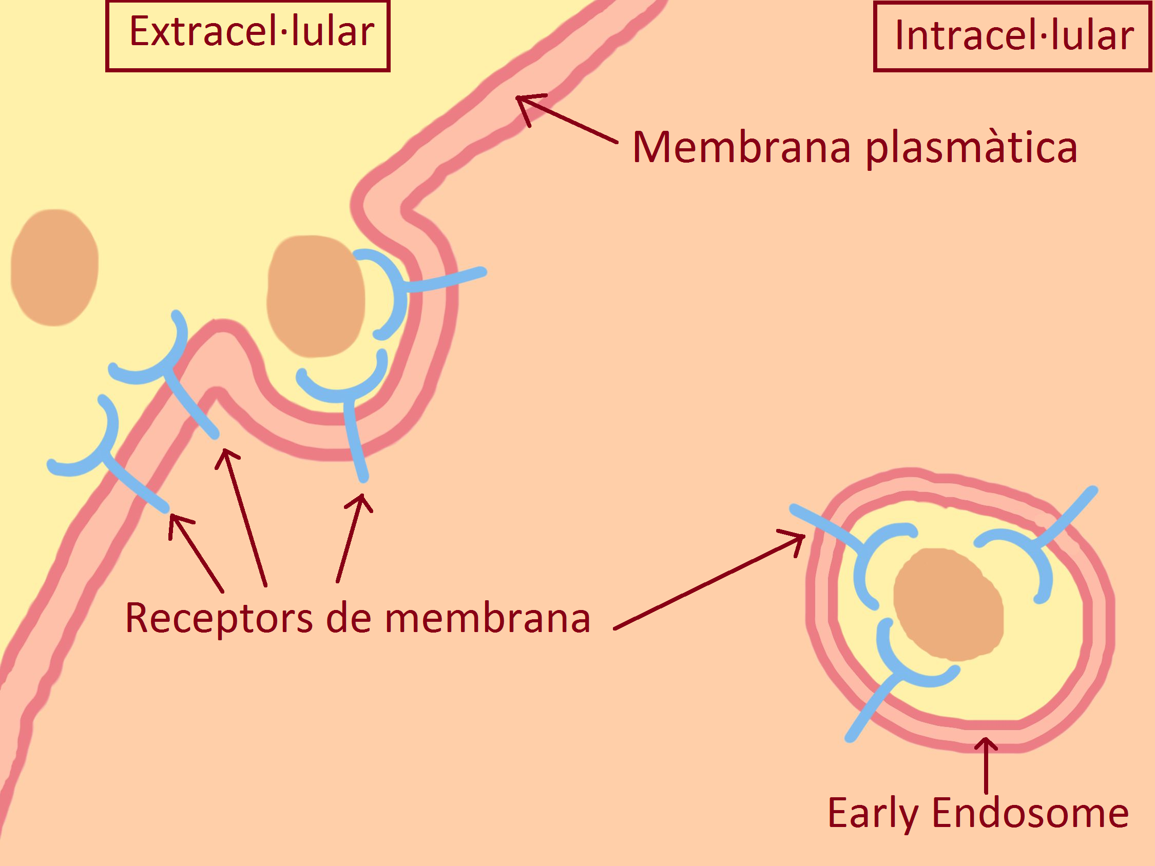 breve esquema